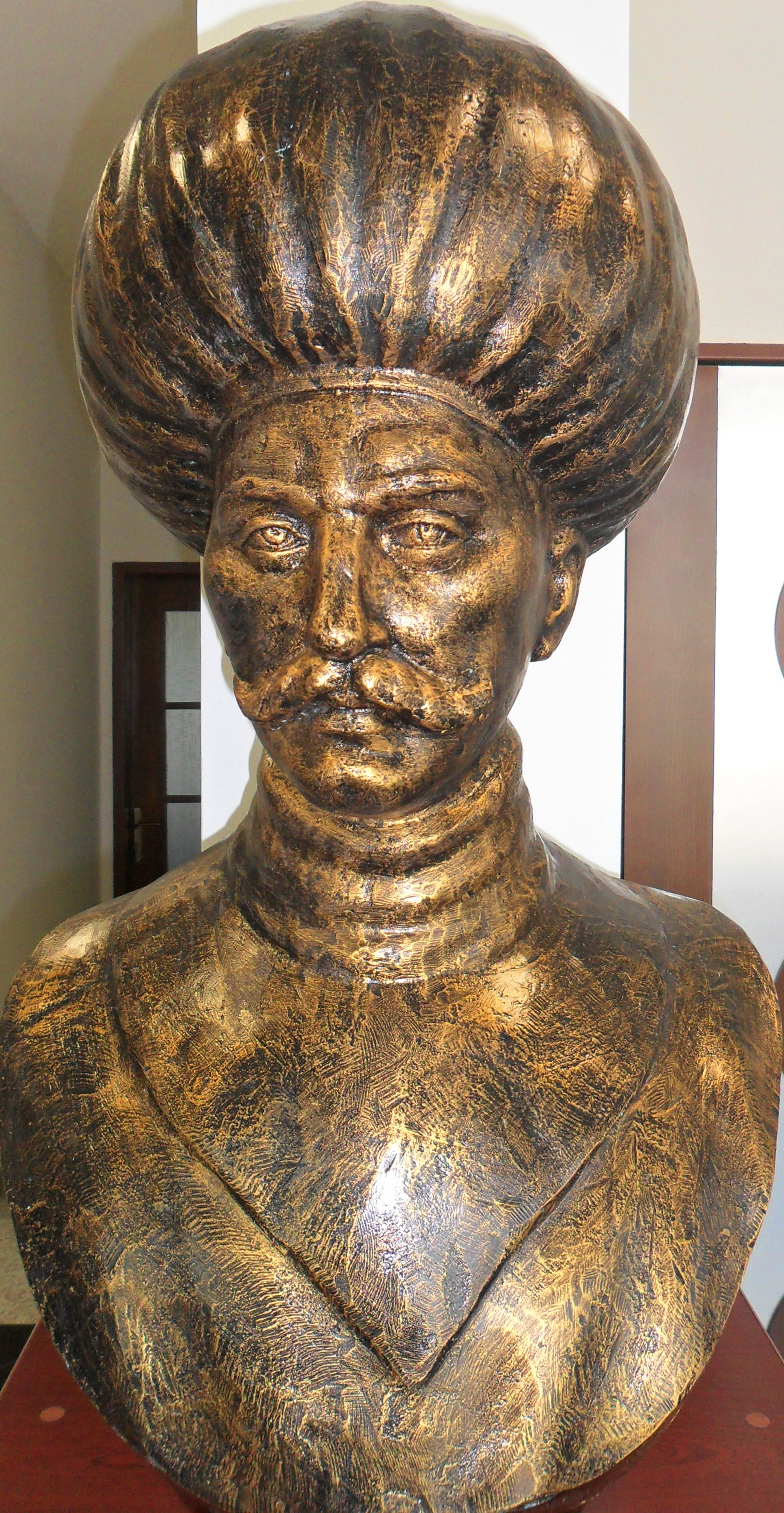 Mersin Deniz Müzesinde bulunan Kılıç Ali Paşa büstü.